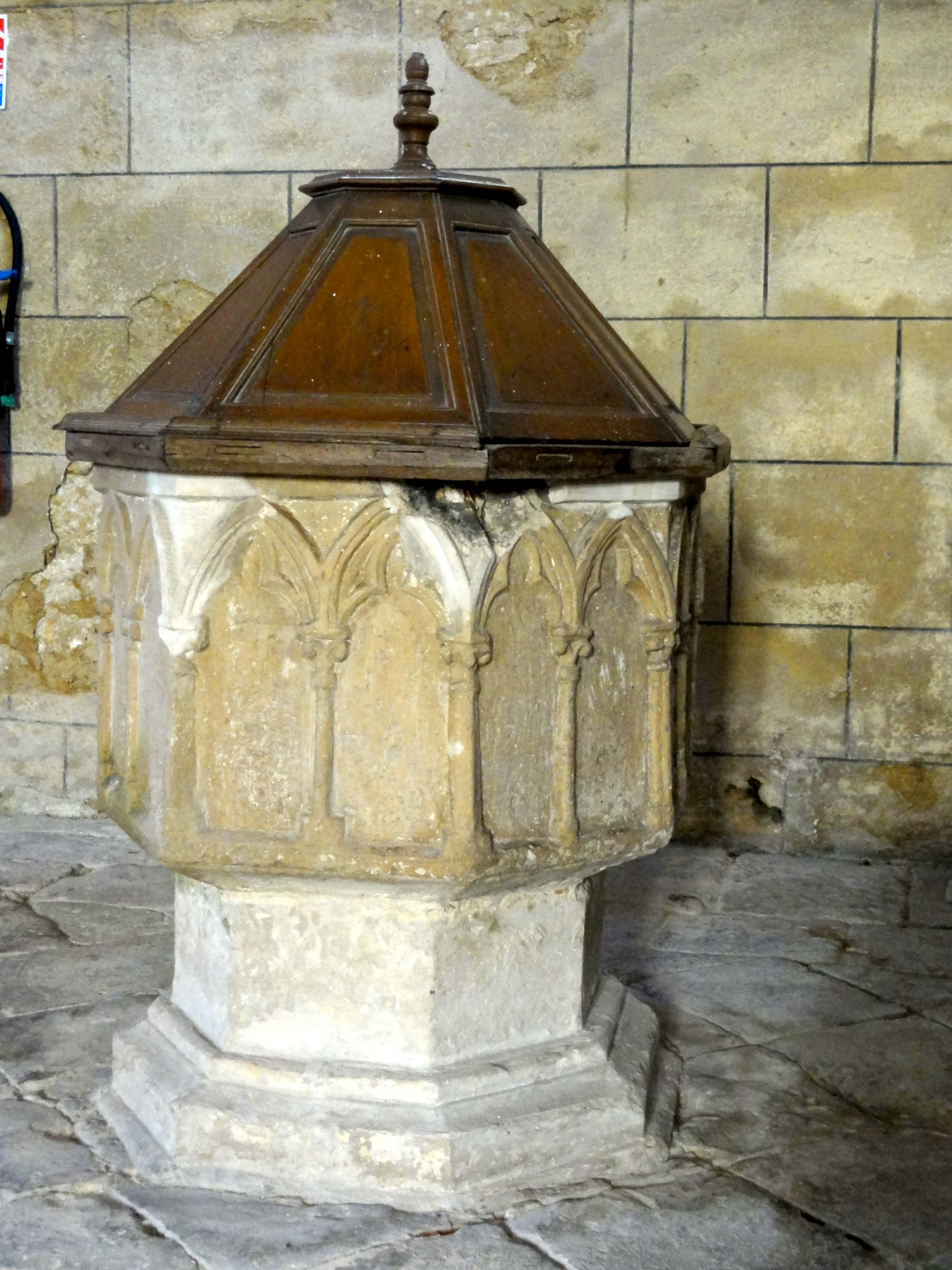 Fonts baptismaux.